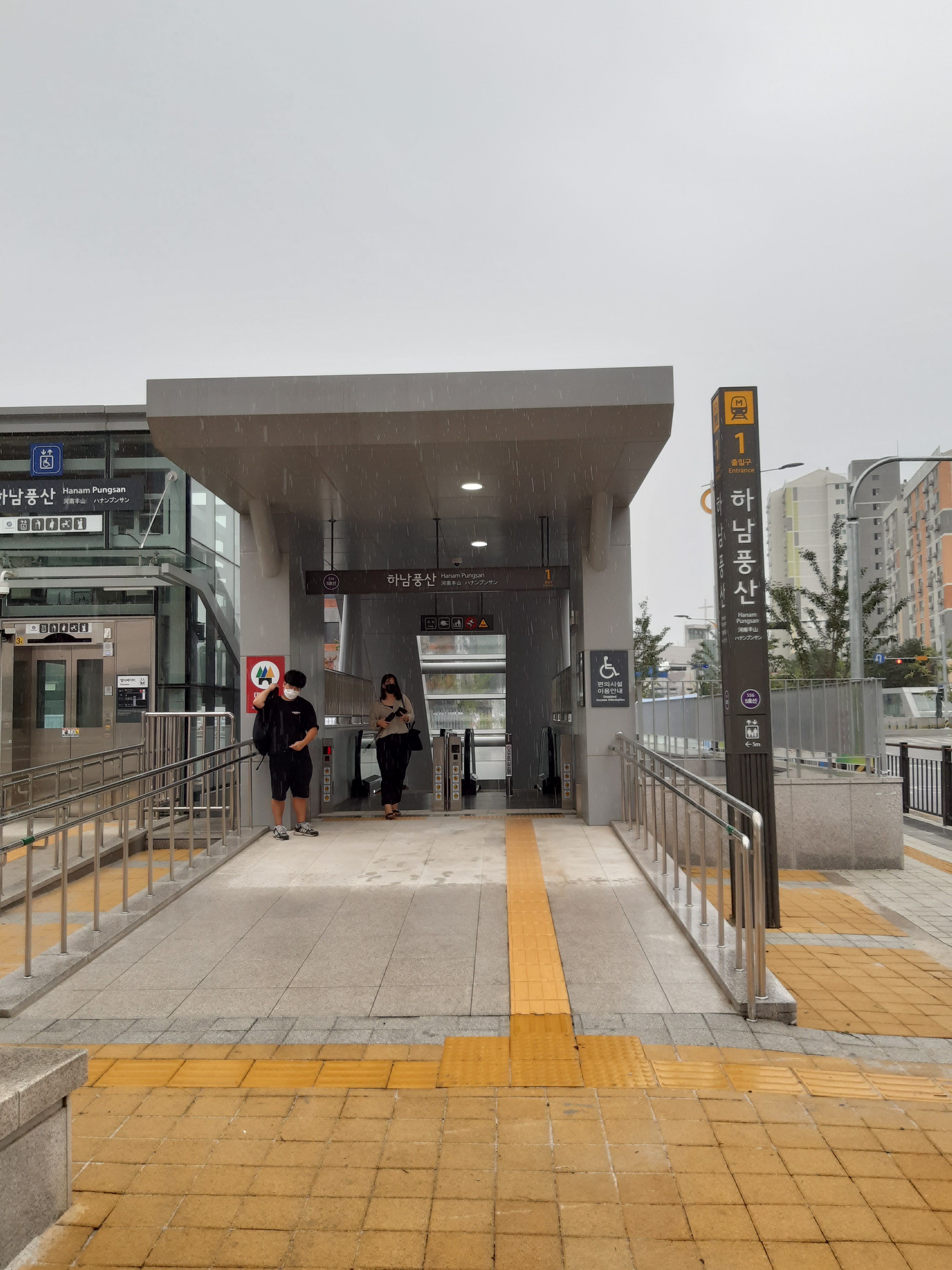 하남풍산역 1번출구